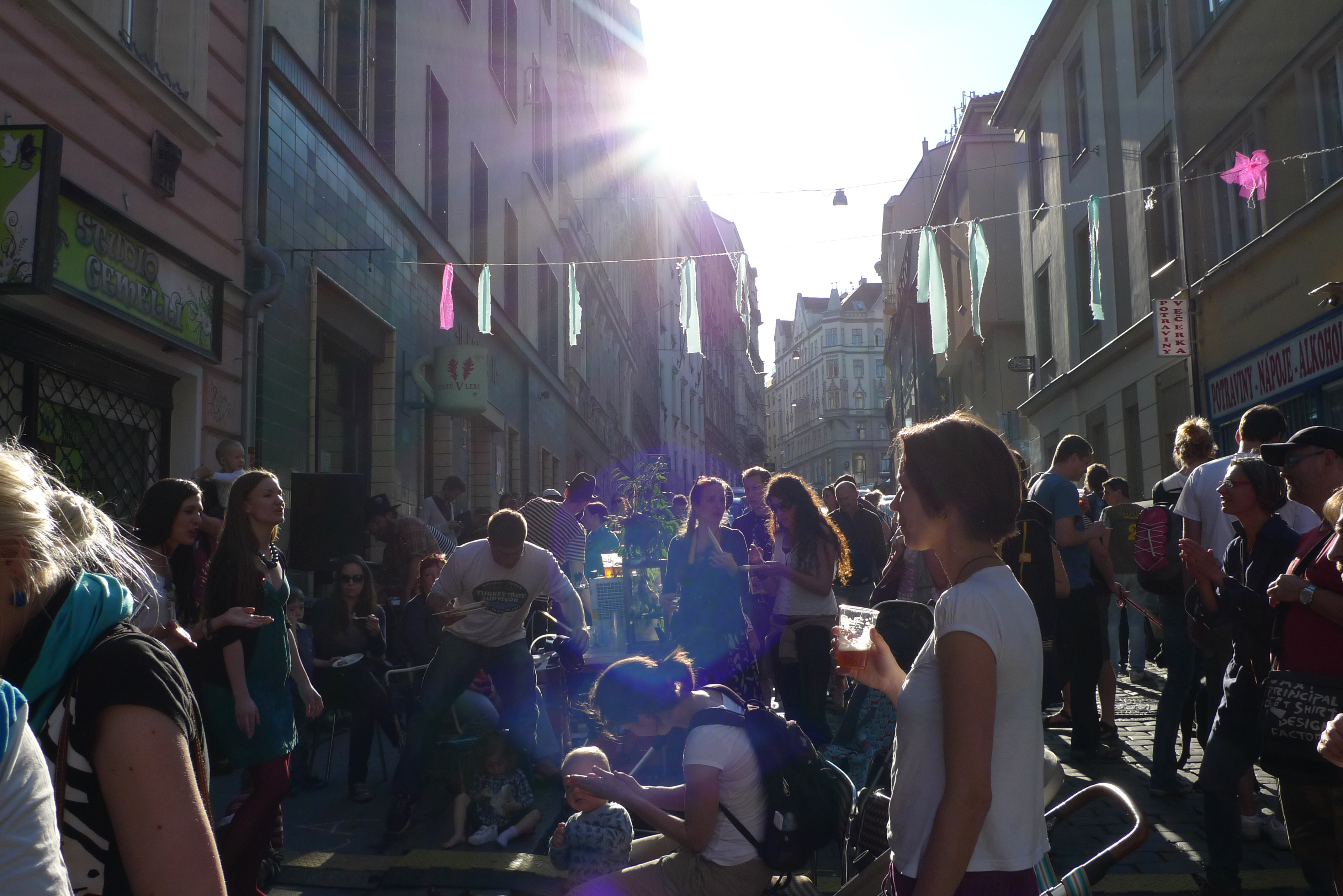 Sousedská slavnost Korso Krymská, 18. 5. 2013, Praha 10-Vršovice.